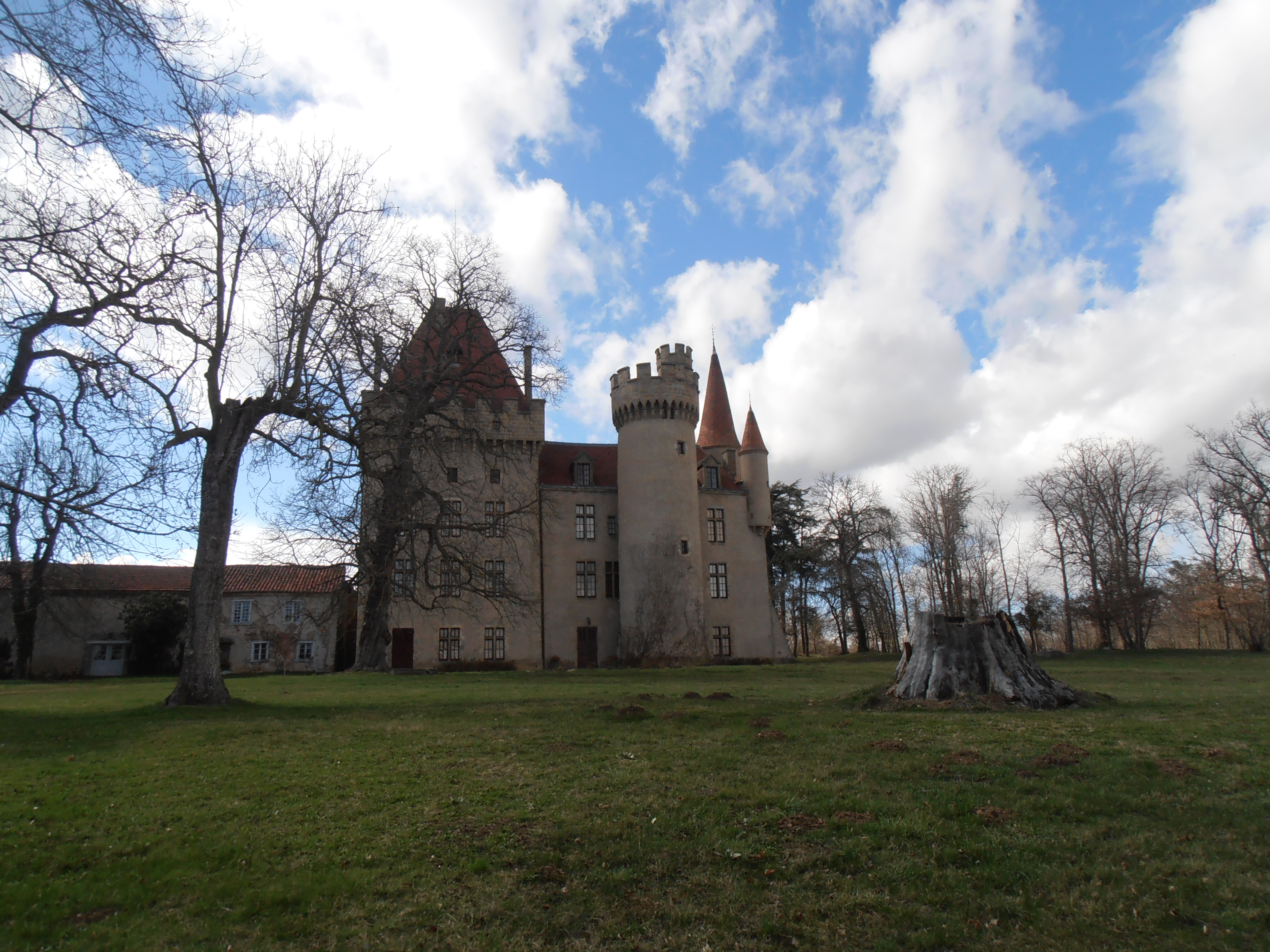 Château de Védrines (Inscrit) .